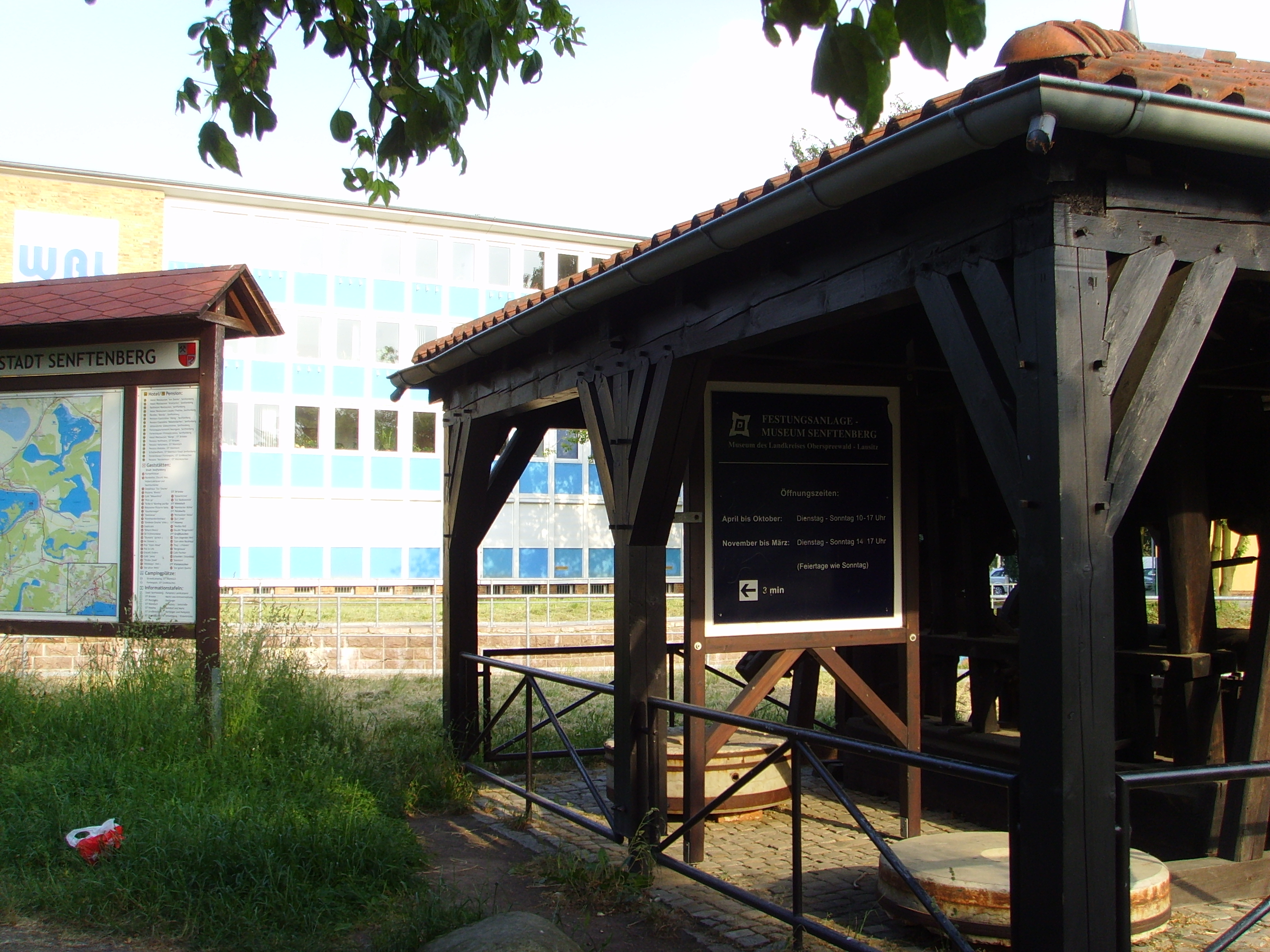 Standort der alten Amtsmühle in Senftenberg; zu sehen sind Reste der Lehragksmühle; im Hintergrund das Verwaltungsgebäude des Wasserverbands Lausitz (WAL)